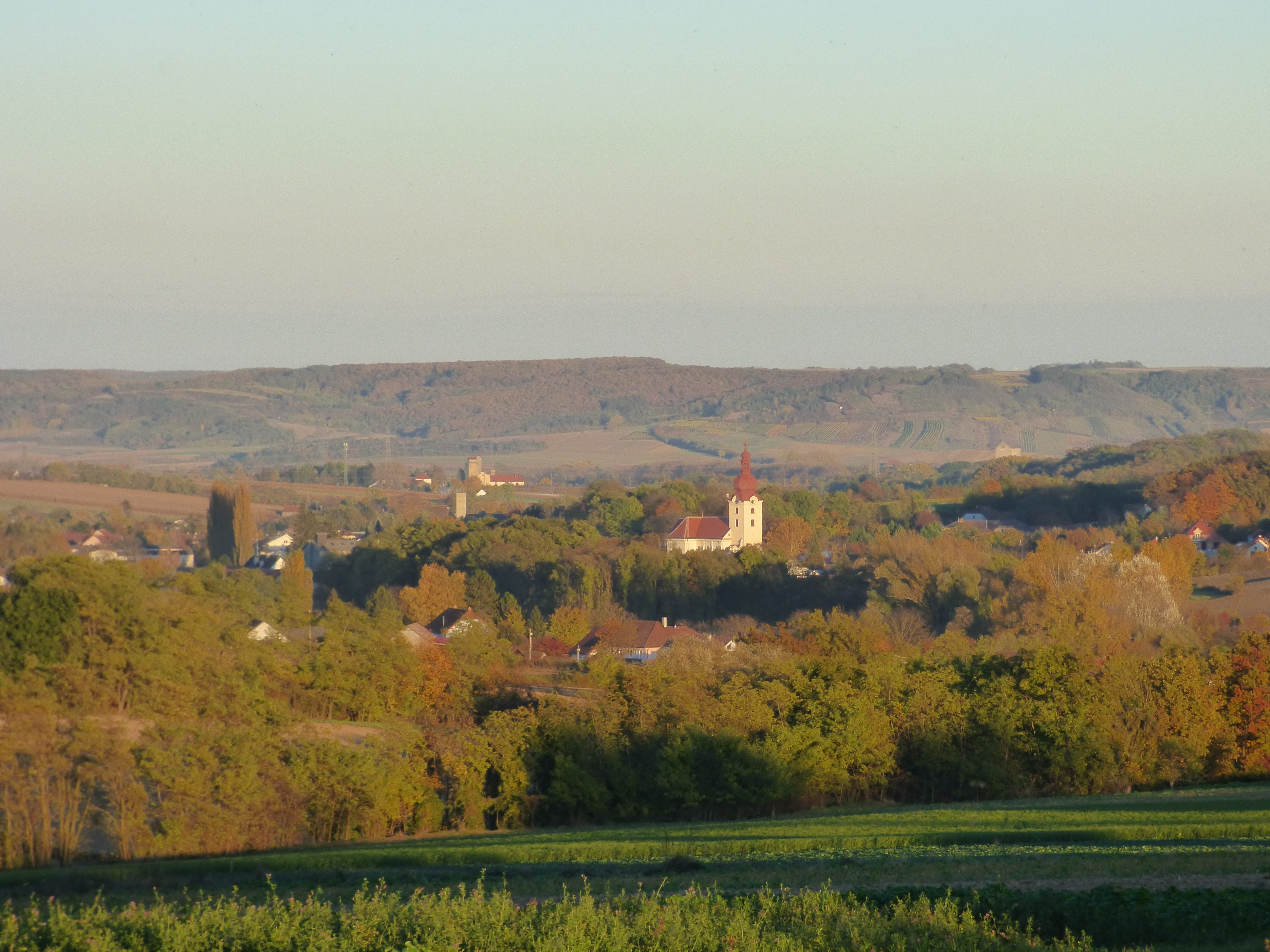 Blick auf Ravelsbach, Standort: etwas nördlich von Baierdorf.